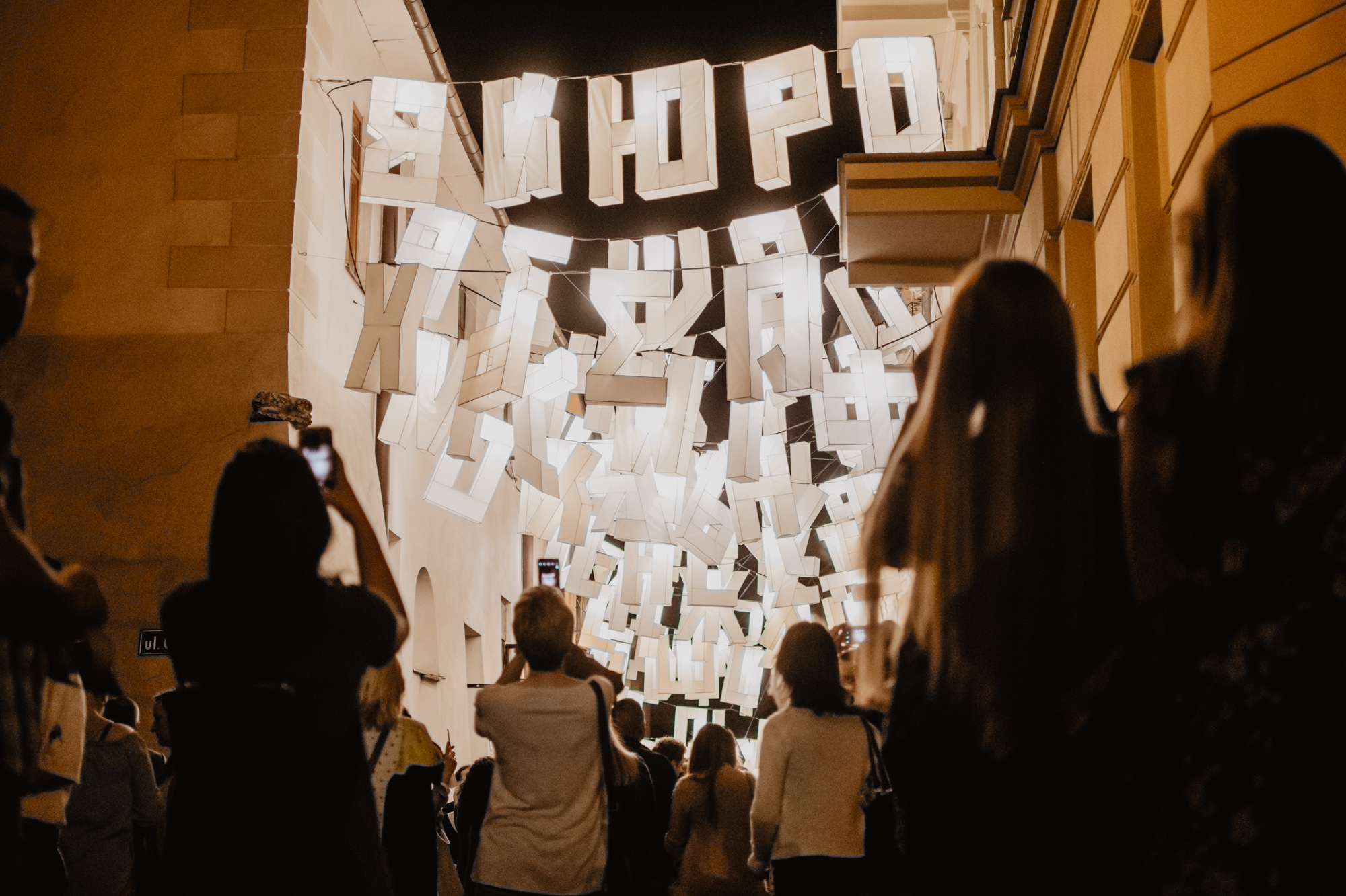 Noc Kultury fot. Jakub Bodys